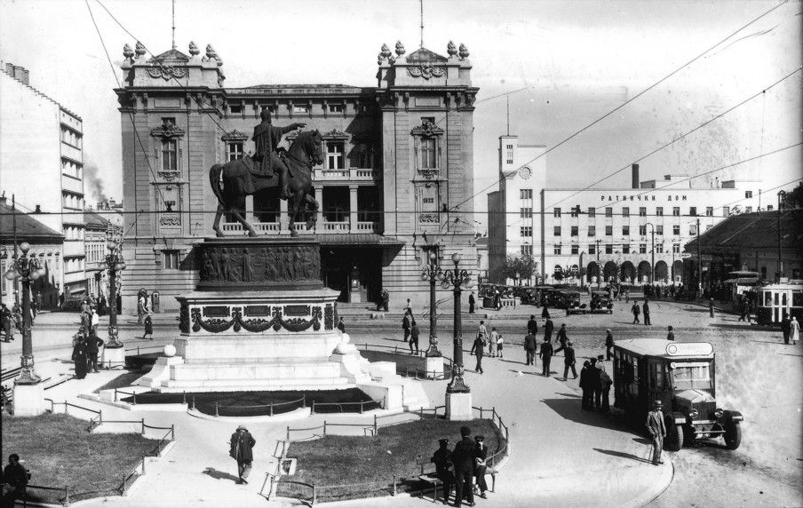 Socha knížete Michaila v Bělehradě na přelomu 19. a 20. století